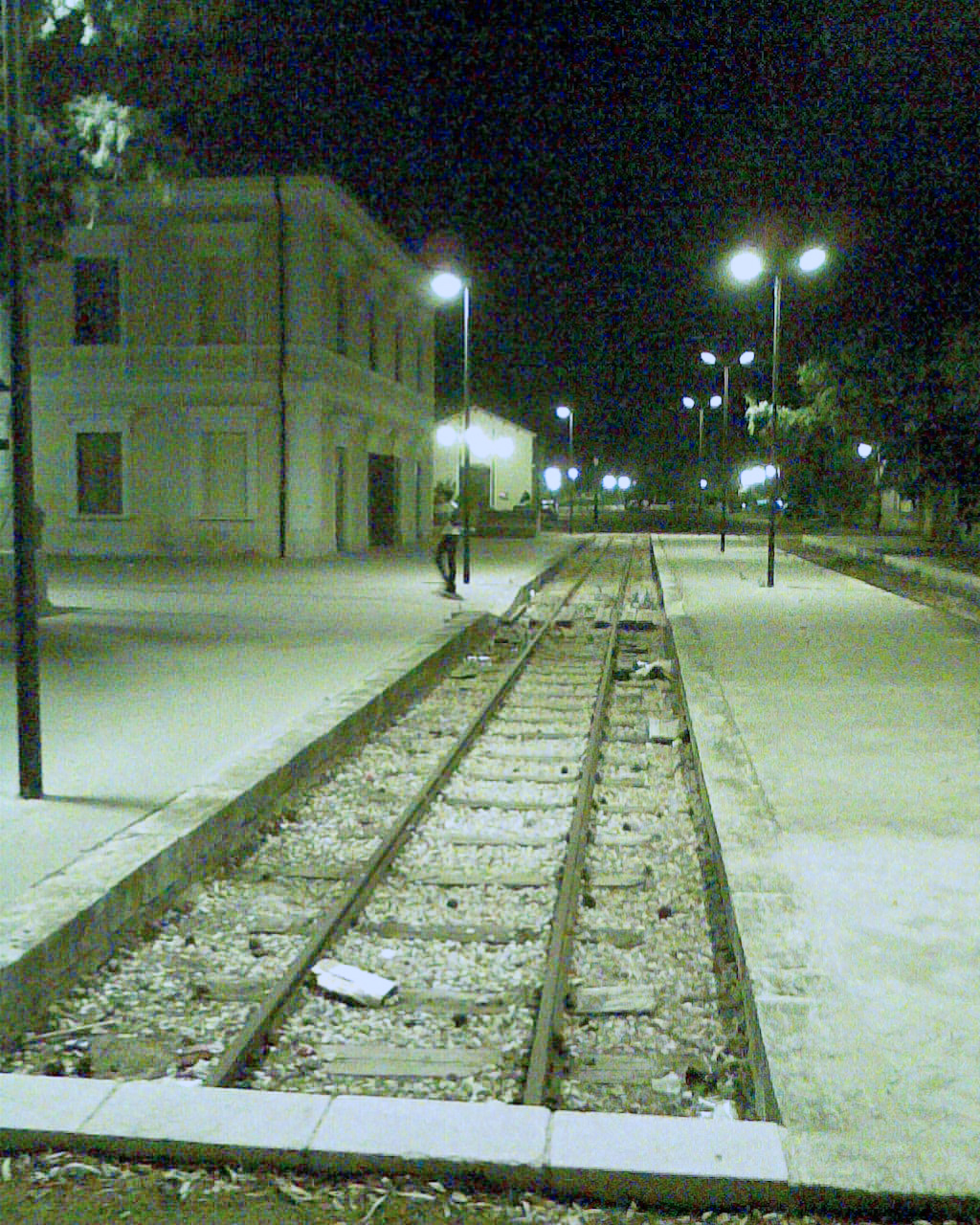 Stazione ferroviaria di Selinunte.